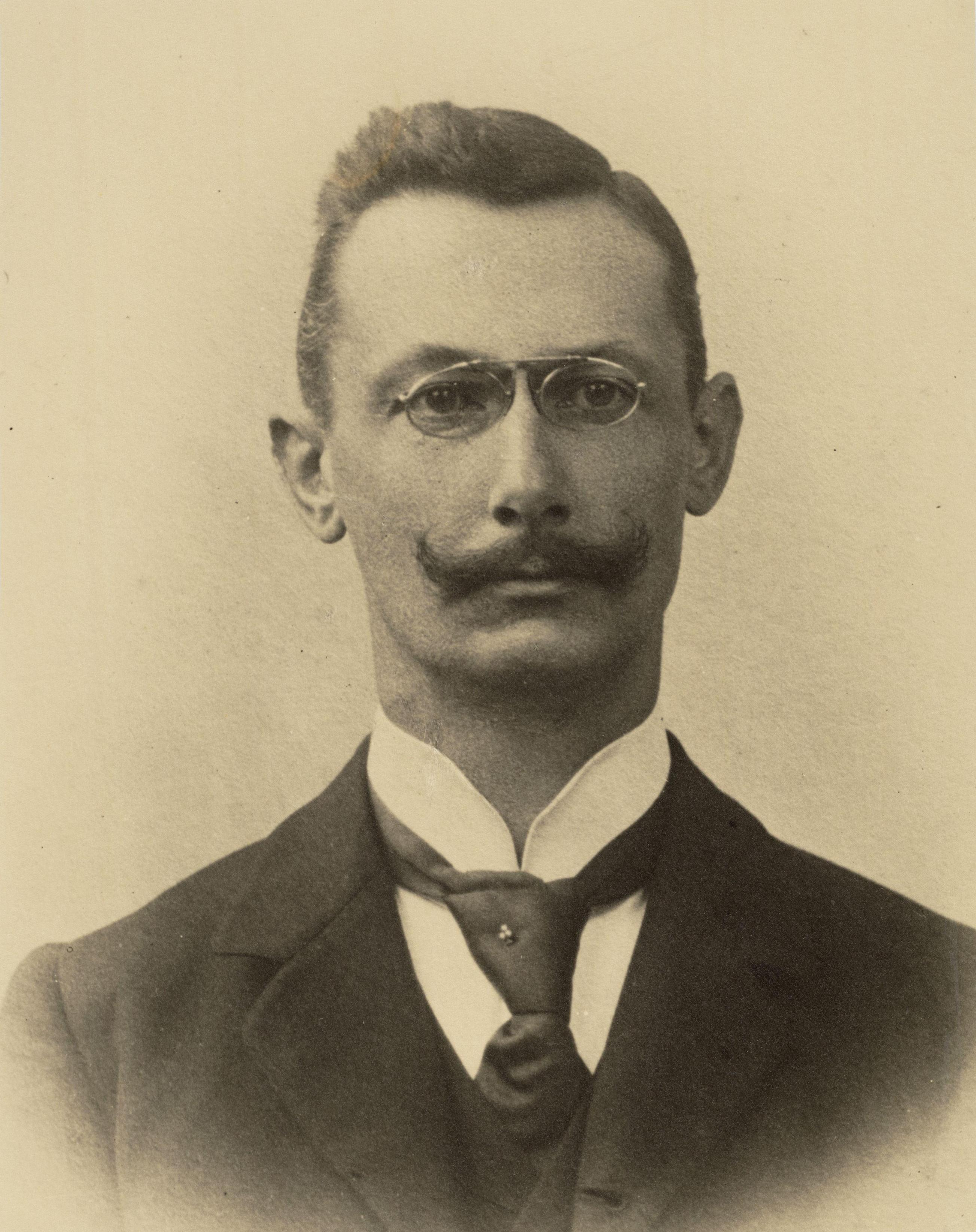 H.S. Hordijk (1862-1930); Hoofdcommissaris van politie te Amsterdam / Chief Constable of the Amsterdam Police